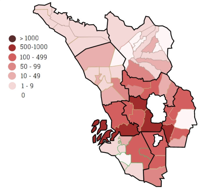 Peta Jumlah Kes COVID-19 di Selangor